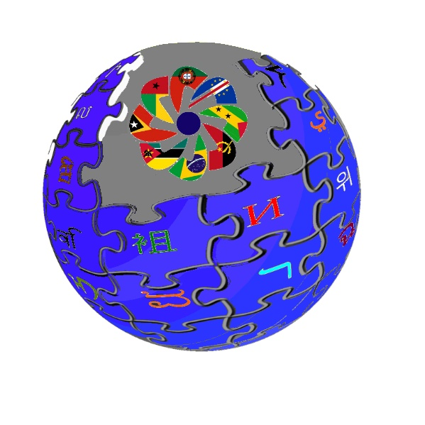 Logotipo da wikipédia, com adaptação do logo da cplp